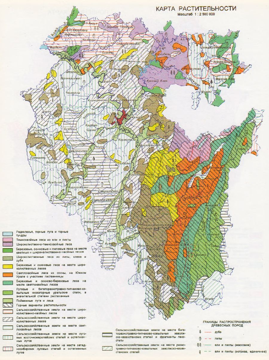 Карта растительности БашкортостанаКарта: проекция — равноугольная цилиндрическая, стандартная параллель — 51°19′4.13″с.ш., координаты краёв: север 56.6°, юг 51.5°, запад 53.0°, восток 60.2°